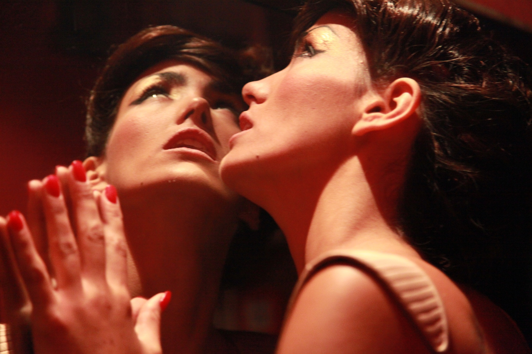 חן יאני בסרטו של דורון ערן נמס בגשם